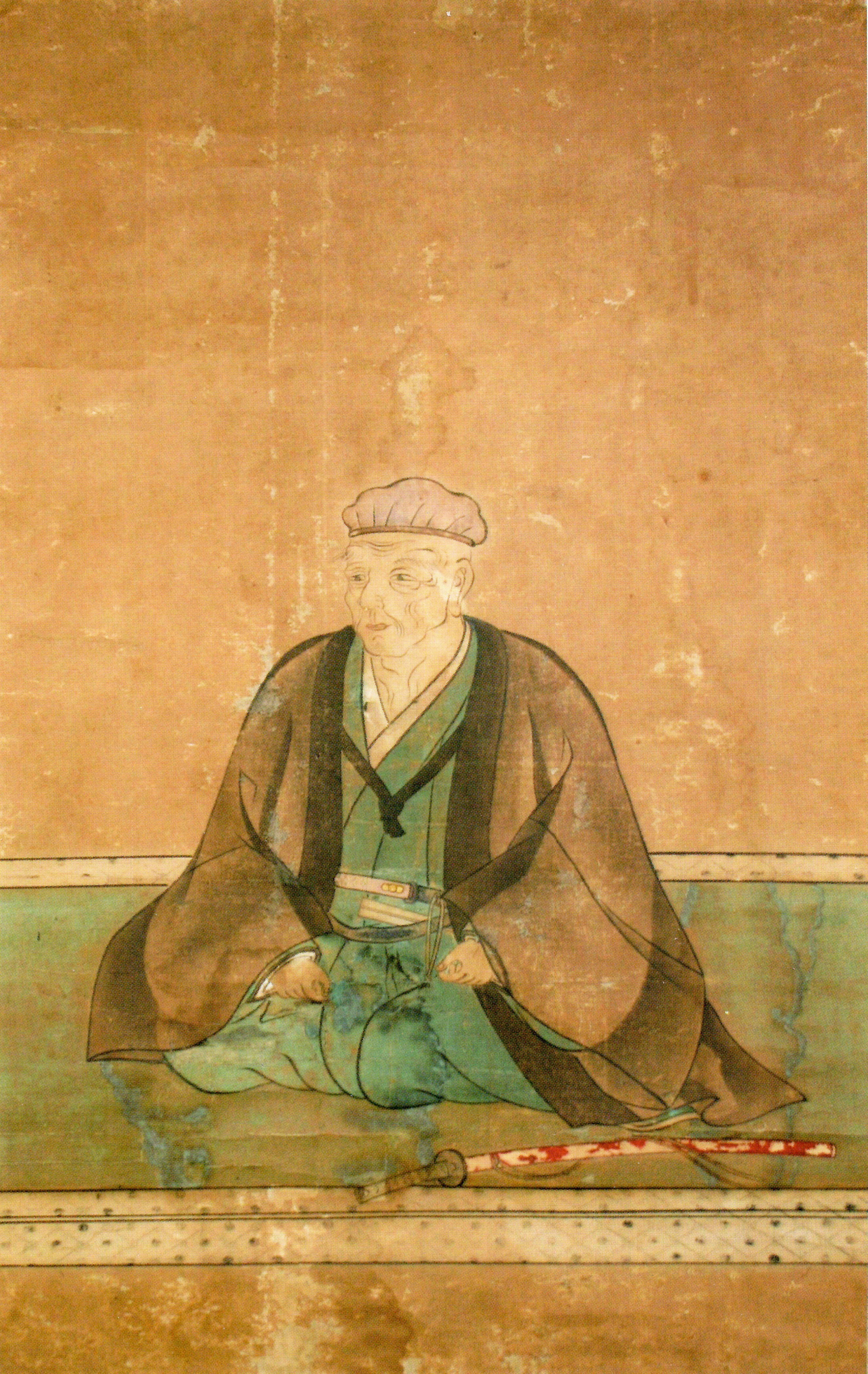 寺西秀則の肖像。